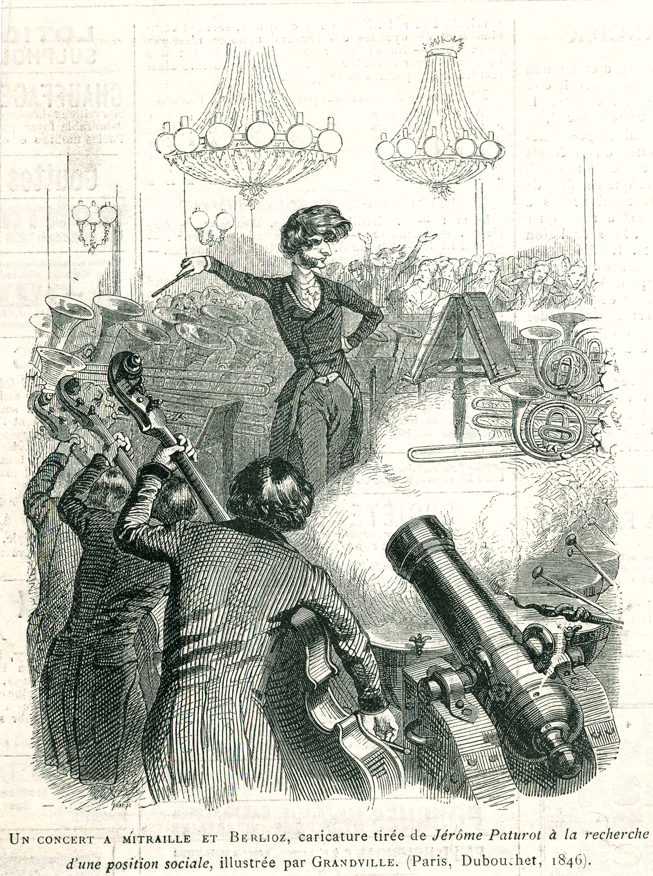 Berlioz Concert à mitraille